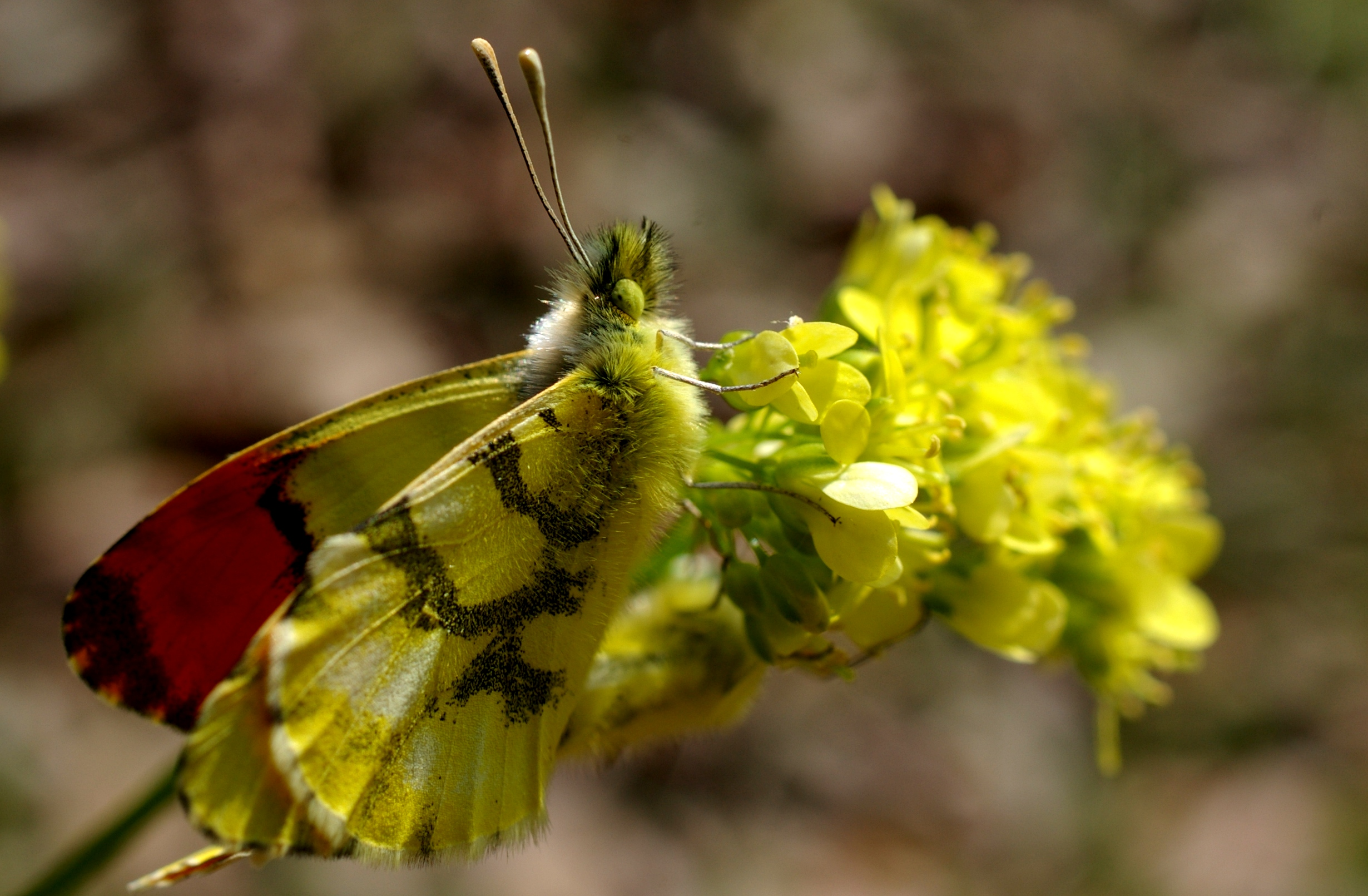 Anthocharis euphenoides. Se confond avec la fleur. (Gorges d'Heric - Hérault)